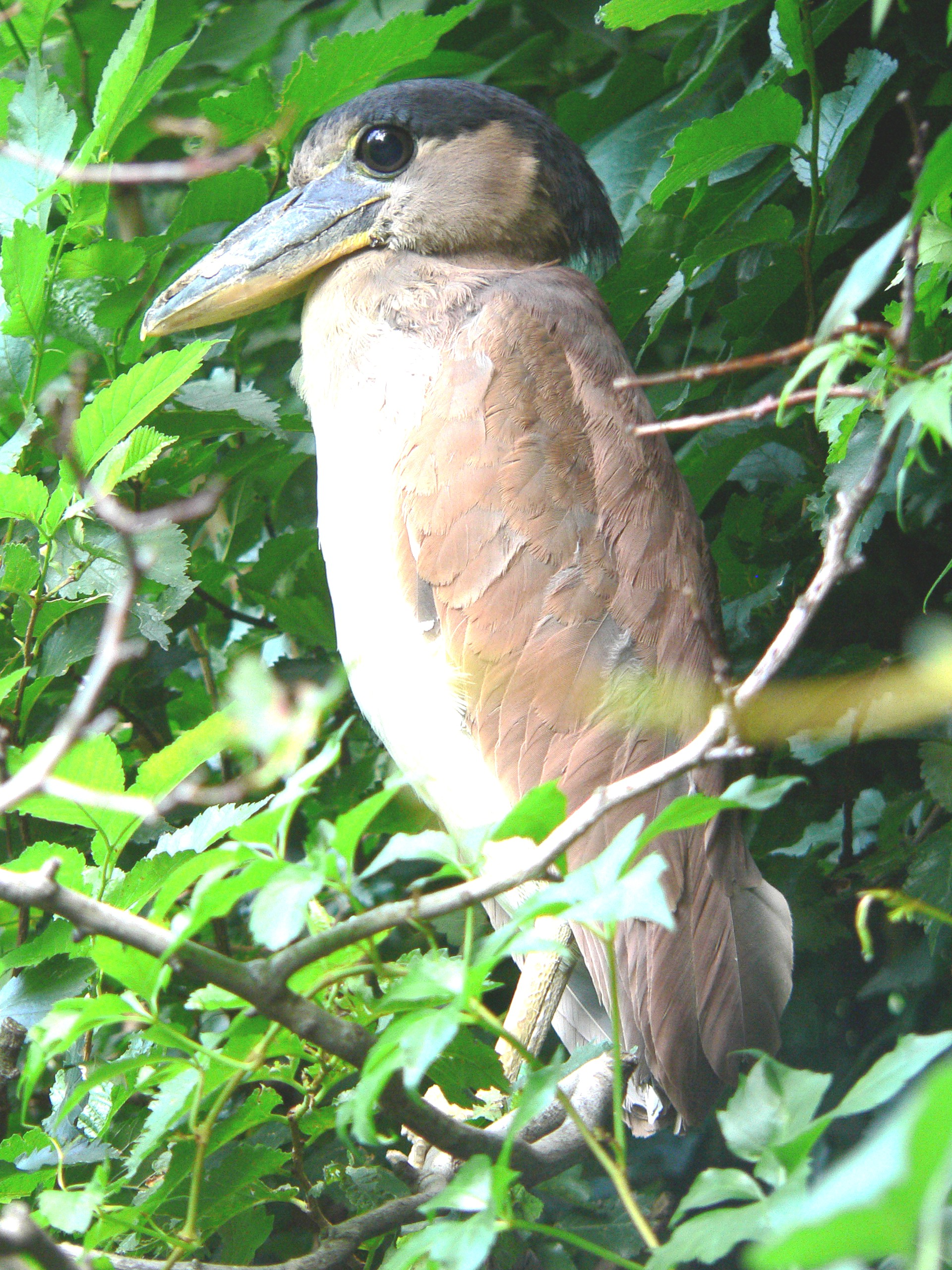 Kahnschnabel